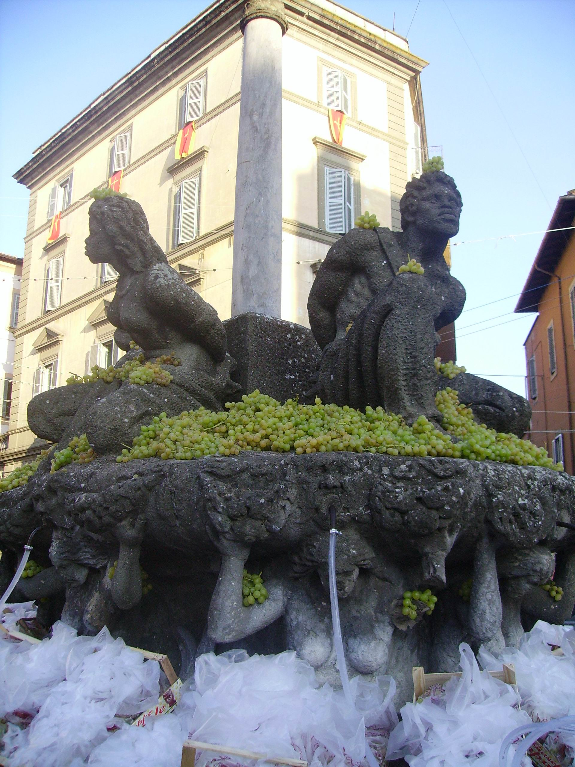 Fontana dei 4 Mori adornata per la Sagra dell'Uva